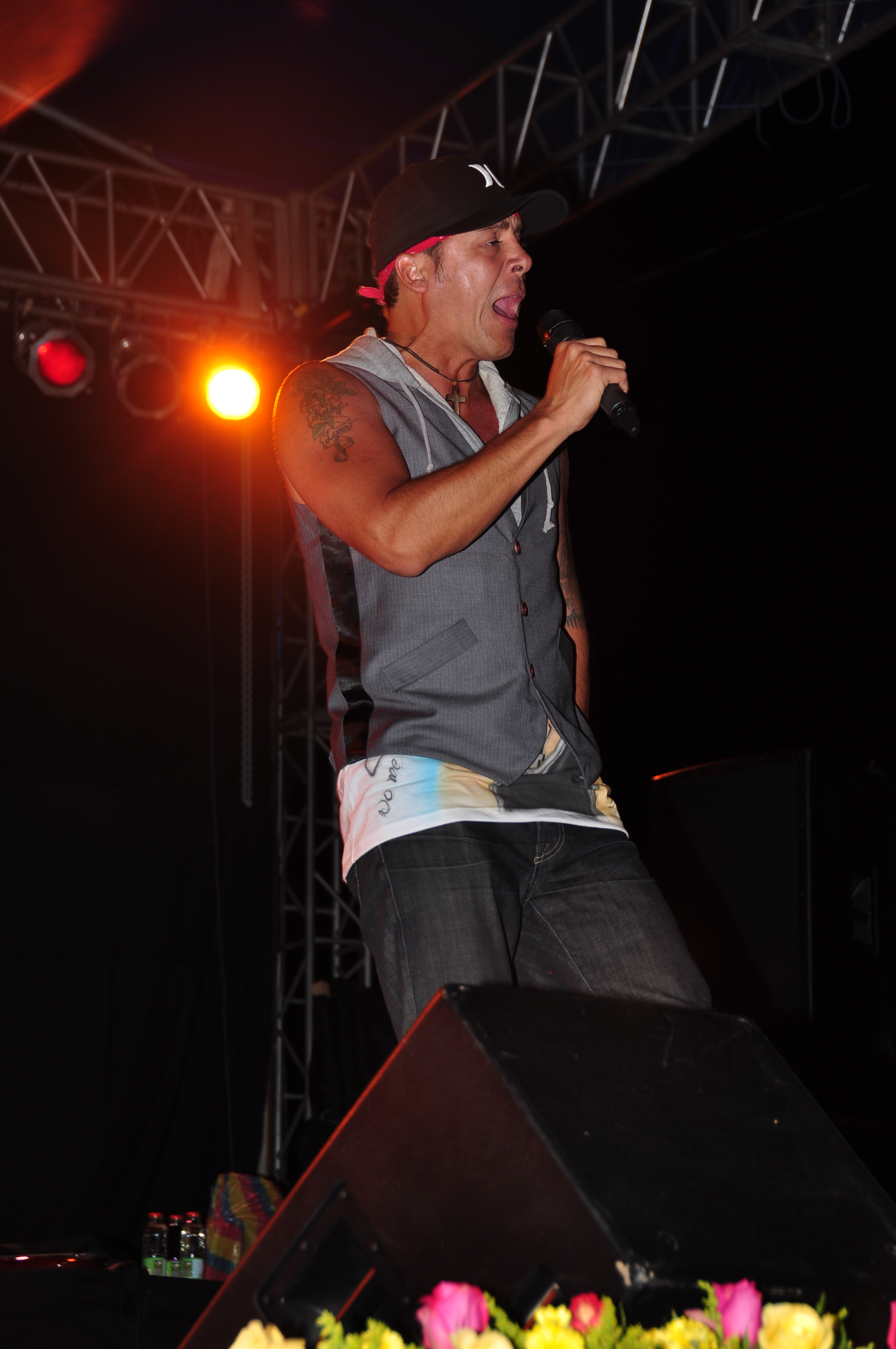 Concierto Generación de Campeones con la actuación de Gerardo Mejía, Iglesia Cristiana Alianza